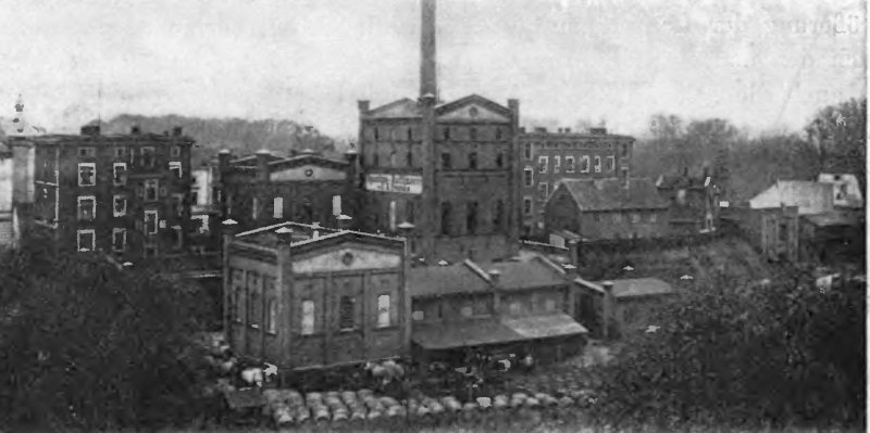 Rafineria spirytusu C.A. Franke przy ul. Czartoryskiego w Bydgoszczy. Stan z początku XX wieku.